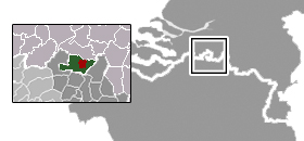 Locatie Baarle Categorie:Afbeelding Baarle-Nassau